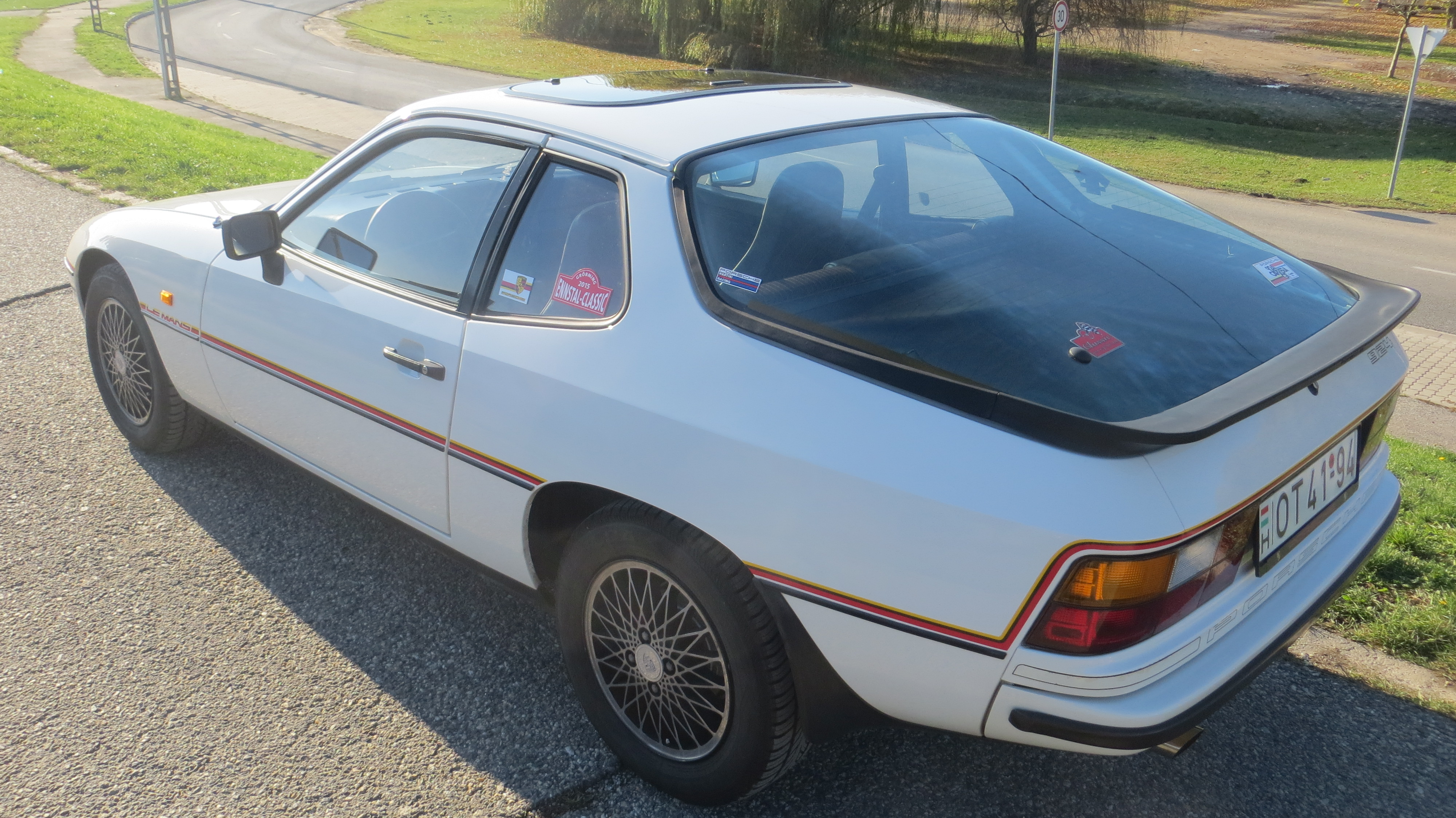 Ez a különleges modell a Porsche Le Mans-i 24 órás autóversenyeken elért hatalmas sikerei előtti tisztelgés. Összesen 1002 darab (más források szerint 1030) épült a modellből, mindegyik alpesifehér színben, körbefutó sárga-fekete-vörös díszítő csíkkal, az első sárvédőkön ugyanilyen színű Le Mans felirattal. A modellen a 924 Turbo hátsó spoilere van, 6J×15-ATS Turbo-Look keréktárcsák, belül csíkos „Nadelstreifen” kárpitozású Turbo ülések fehér szegéllyel, 36 cm átmérőjű négyküllős bőrkormány, bőr váltógomb, az ajtóküszöbön fekete alapon fehér 924 felirat. A gépkocsihoz többféle extrát is lehetett rendelni, elektromos ablakot, elektromosan állítható külső tükröket, hátsó ablaktörlőt, fényszórómosót, légkondicionálót és kivehető targatetőt is. Jobbkormányos kivitelben 100 darab készült.